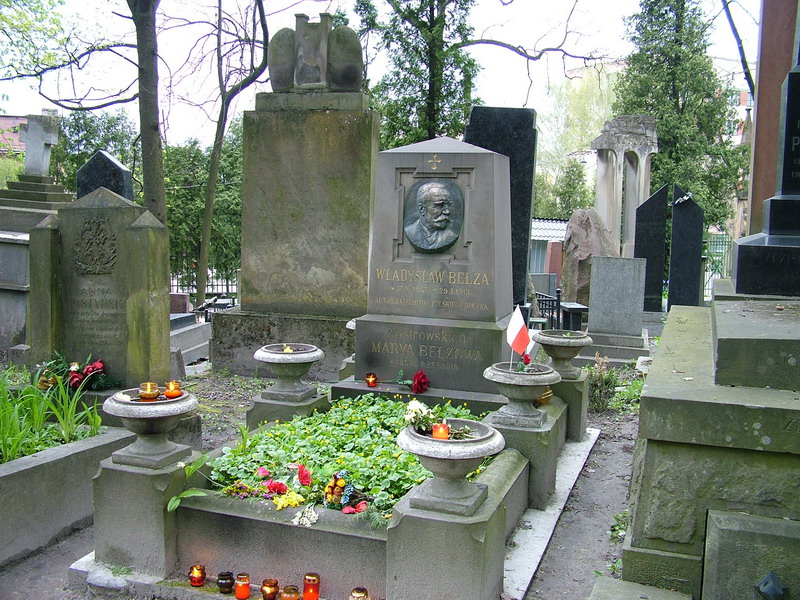 Grób Władysława Bełzy na cmentarzu Łyczakowskim. Maj 2005. Autor: Stanisław Kosiedowski.